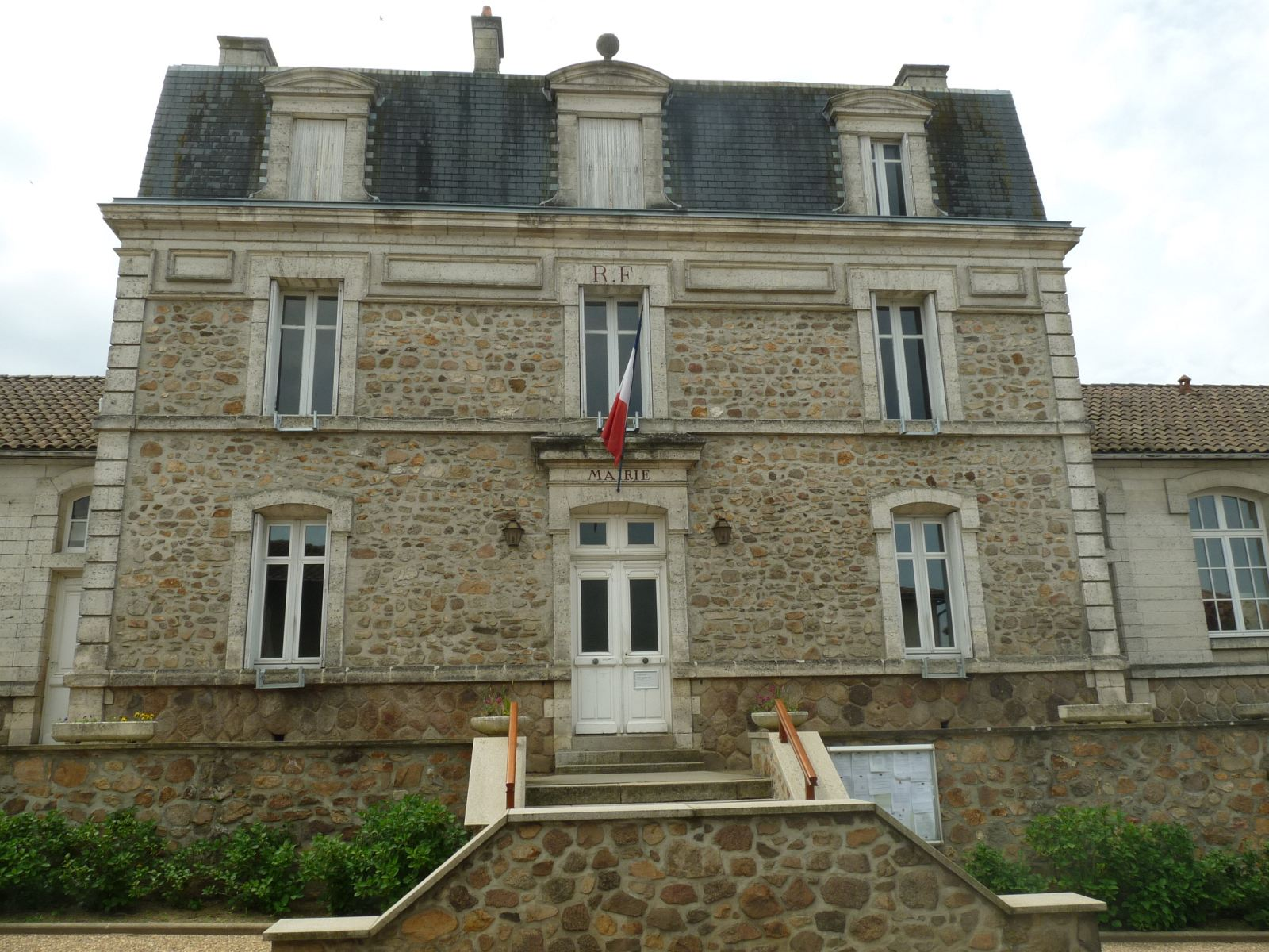 mairie d'Étagnac, Charente, France